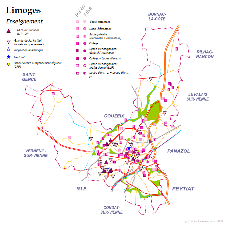 Carte de Limoges, avec les écoles, les collèges, les lycées et les sites de l'enseignement supérieur